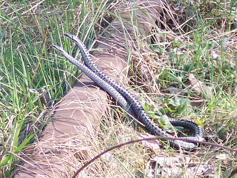 Place: Kowary, Poland